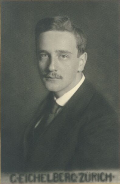 Porträt von Gustav Eichelberg